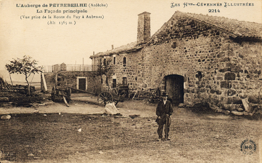 Carte postale ancienne de l'auberge de Peyrebelle